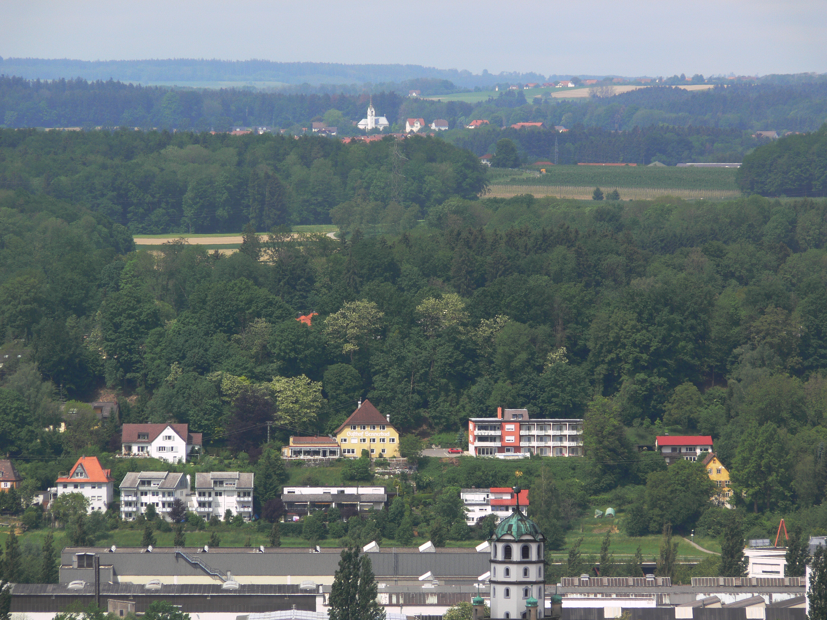 Ravensburg; Blick von der Schlierer Straße über die Altstadt hinweg (unten noch die Spitze des Blaserturms) auf die gegenüberliegende Westseite des Schussentals: Sennerbad (mit Hotel) und am Bildrand ganz oben die Ortschaft Schmalegg